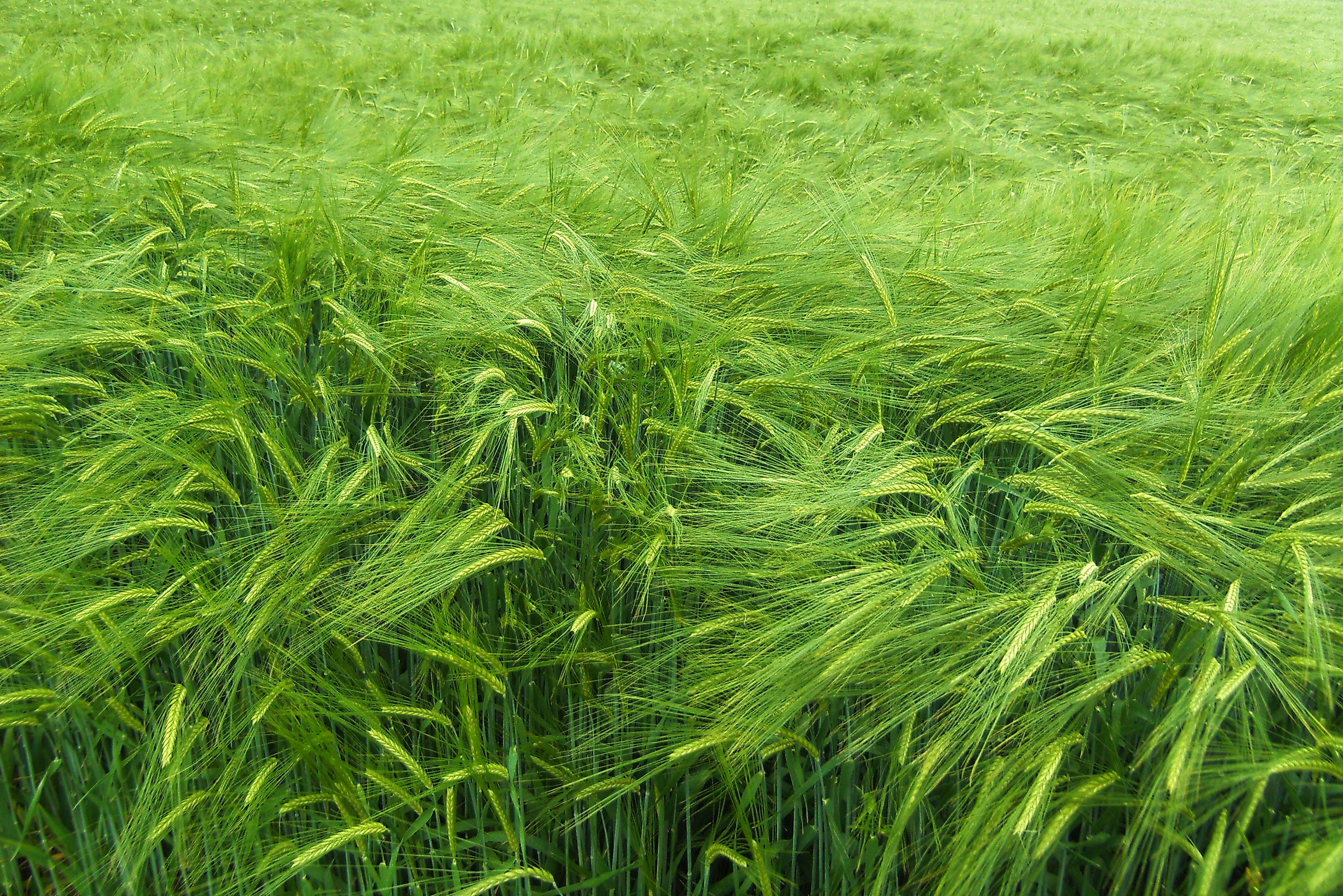 Wintergerste